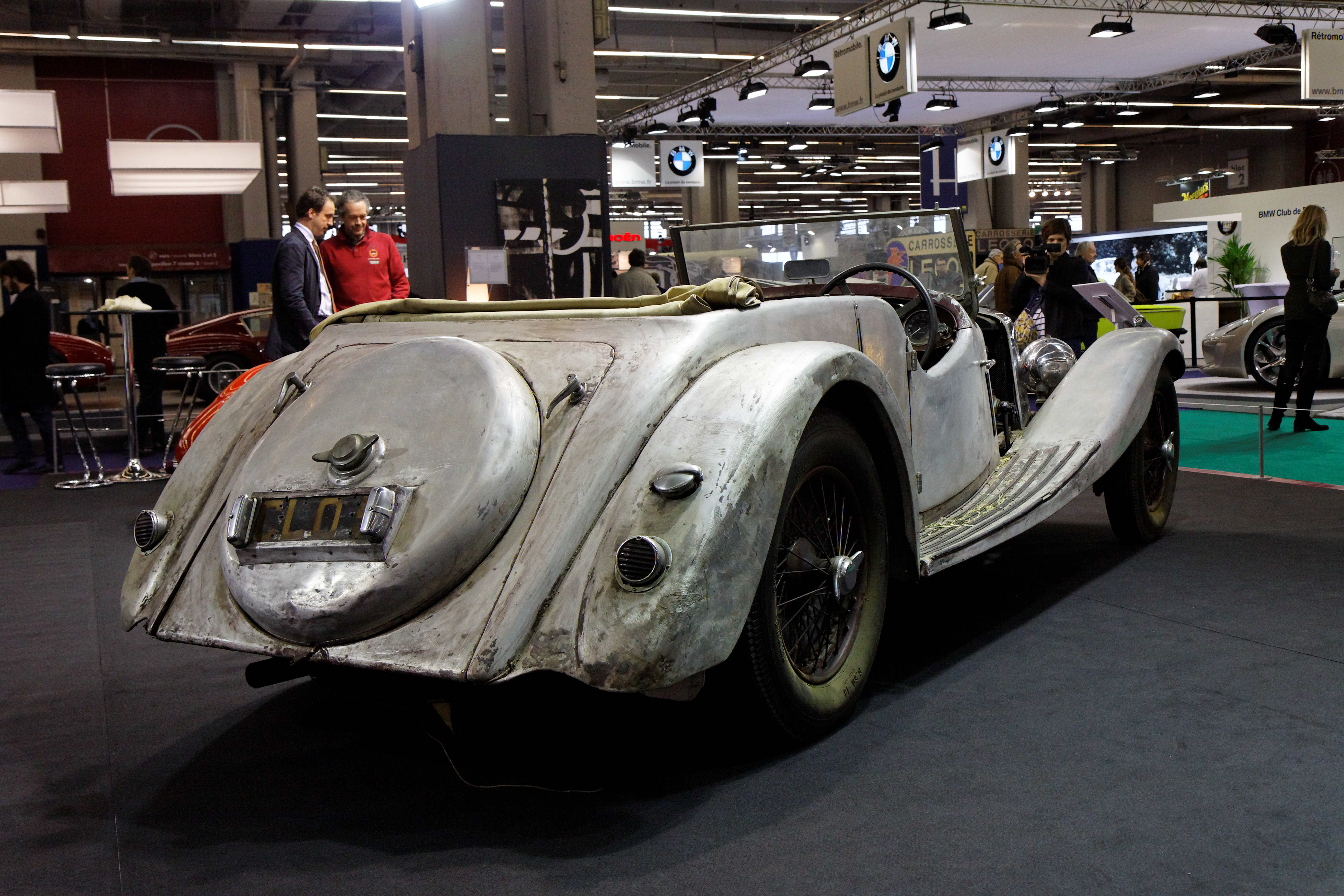 Photographie prise lors du salon rétromobile 2011 à Paris, porte de Versailles.